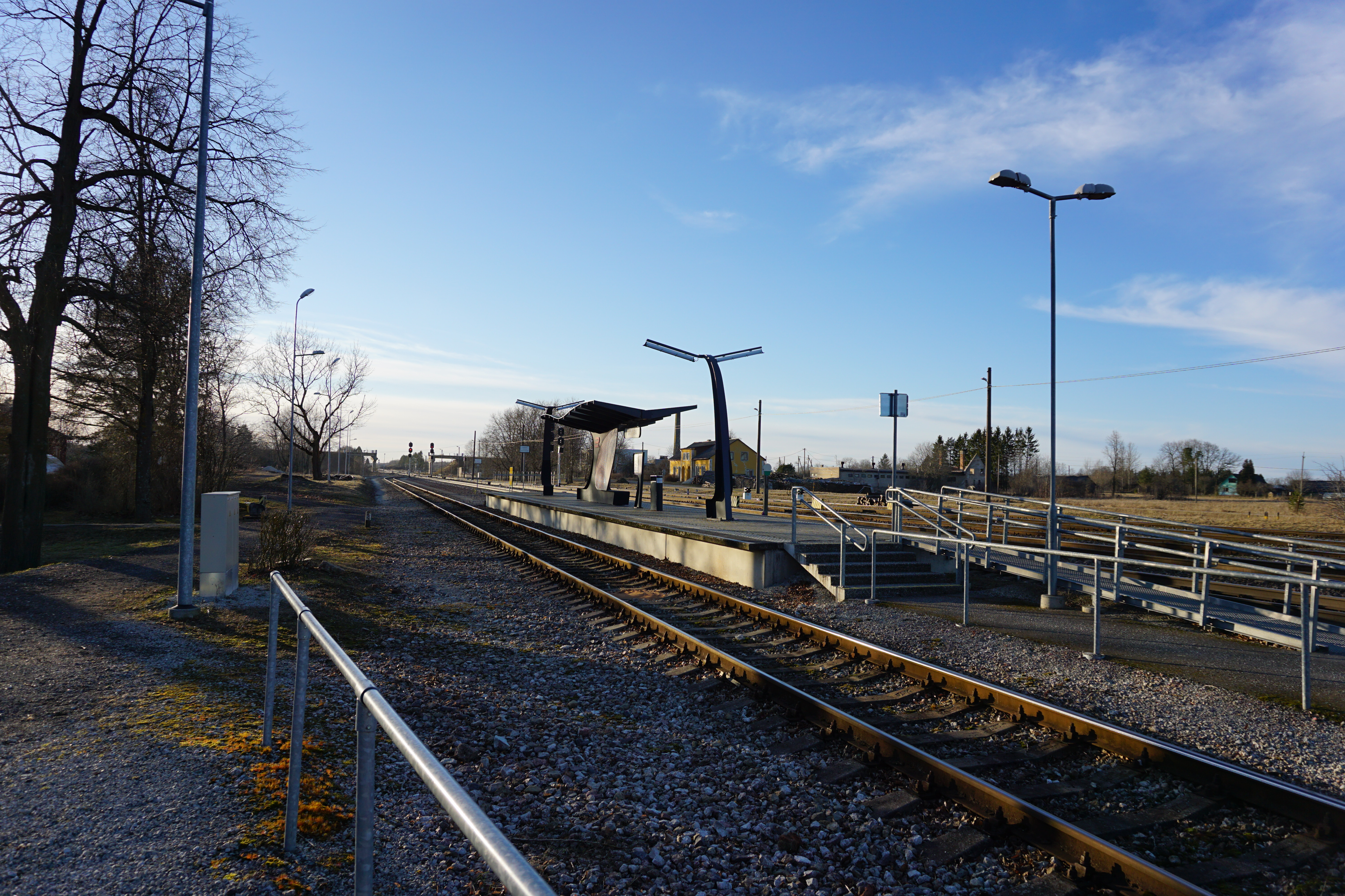 Vaivara jaama lühike teedevaheline perroon